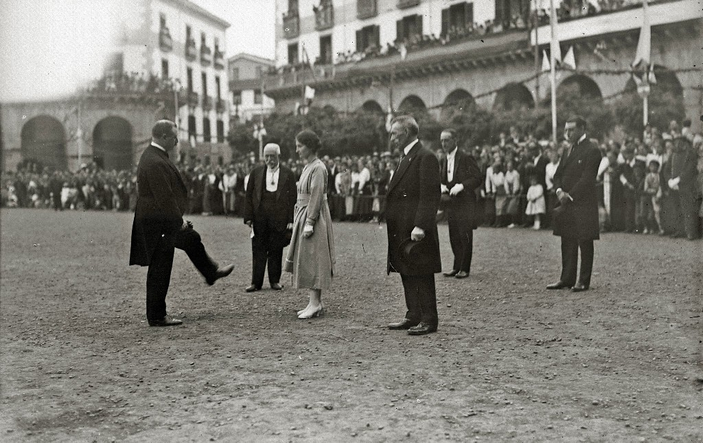 Título original: Celebración del I Congreso Internacional de Estudios Vascos de Eusko Ikaskuntza en la localidad de Oñati (3/9) Localización: Oñate (Guipúzcoa)